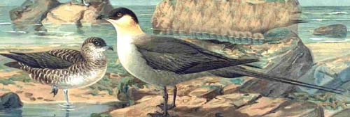 obrázek chaluhy malé z cs::en:Image:Longtailedskua89.jpg zdroj: NAUMANN : Naturgeschichte der Vögel Mitteleuropas